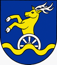 Herb Kraju Bratysławskiego